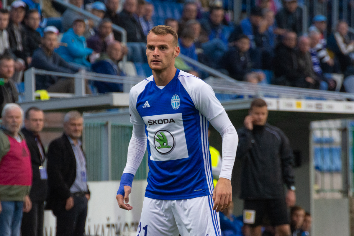 Lukáš Pauschek vs FK Teplice